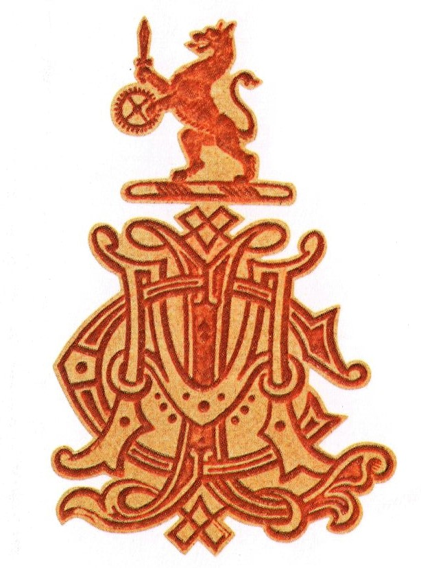 ตราพระยาอภิรักษ์ราชอุทยาน (แฉล้ม อมาตยกุล)